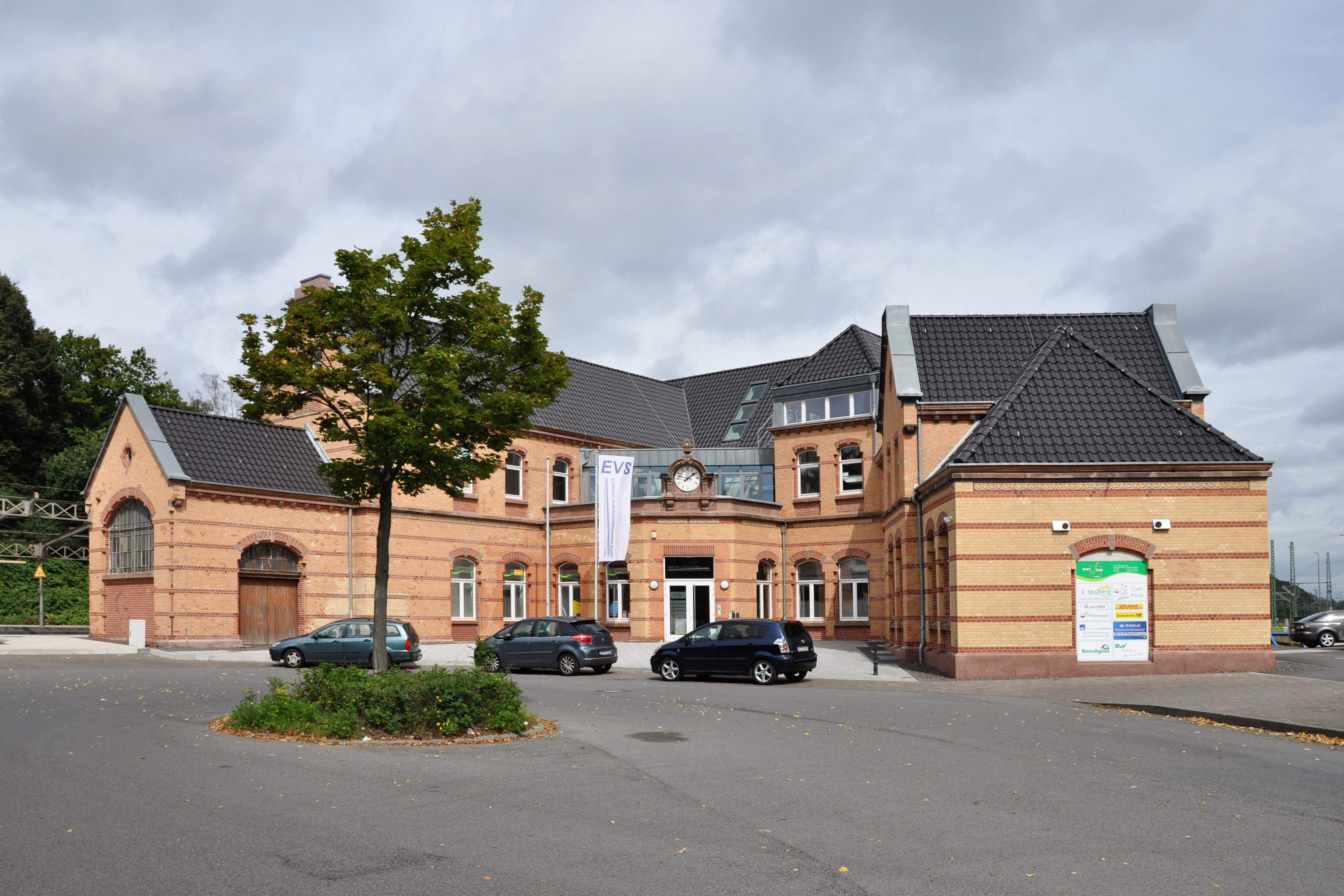 Stolberg Hbf, renoviertes Bahnhofgebäude im Jahr 2014. Heute genutzt als Firmensitz und Stellwerk der Euregio Verkehrsschienennetz.